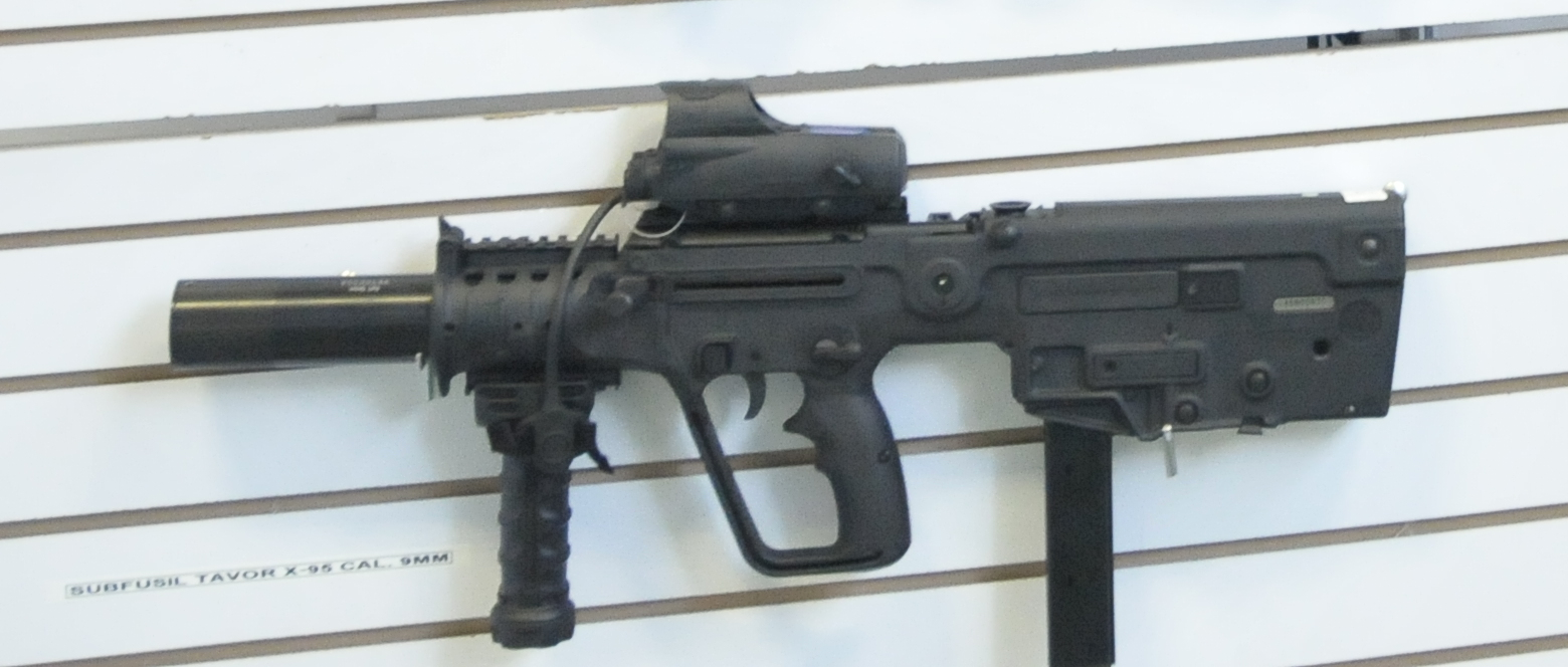 En la ciudad de Medellin - Colombia, se realiza la X Conferencia Regional de la Asociación Internacional de Jefes de Policía; la cual busca fortalecer el trabajo de integración, intercambio de experiencias y de información entre INTERPOL (Organización Internacional de Policía Criminal, AMERIPOL (Comunidad de Policías de América) y CLACIP (Comunidad Latinoamericana y del Caribe DE Inteligencia Policíal). Finalmente, se tiene como objetivos el fortalecimiento, desarrollo de nuevas líneas de cooperaciónde las relaciones entre las agencias y países participantes en el evento, y el presentar la Estrategia de Cooperación Internacional en Seguridad Integral de Colombia.